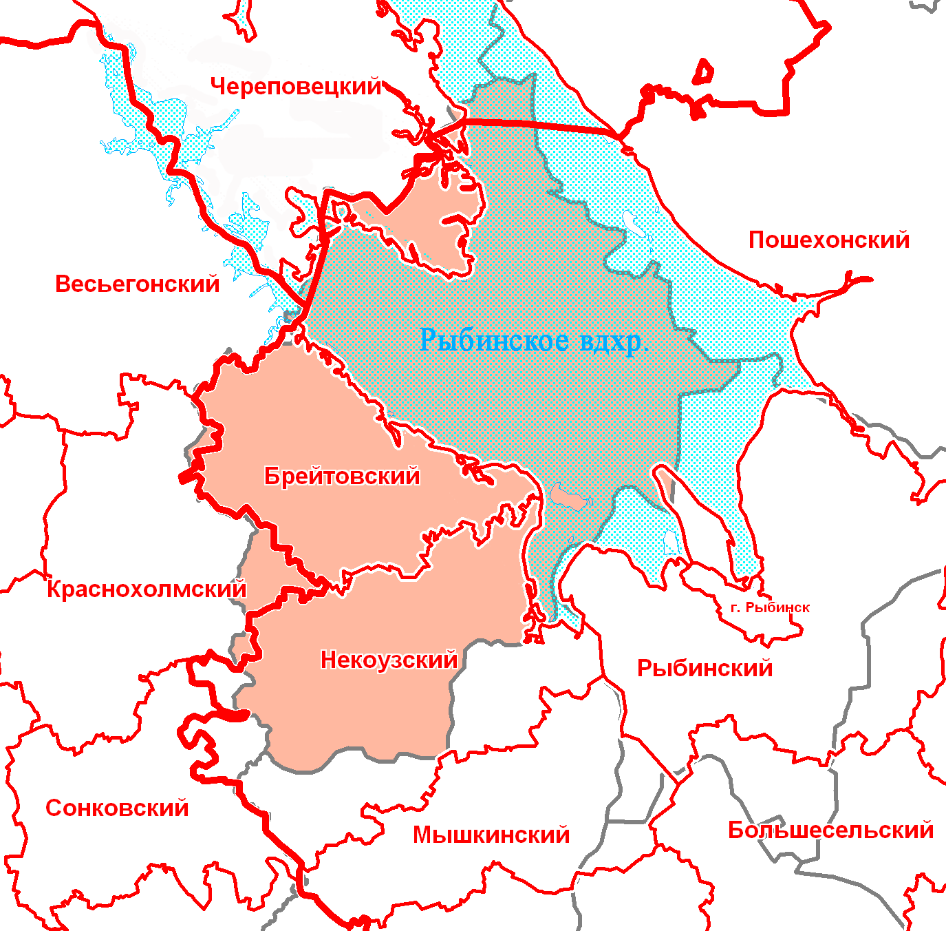 Мологский уезд в современной сетке районов.